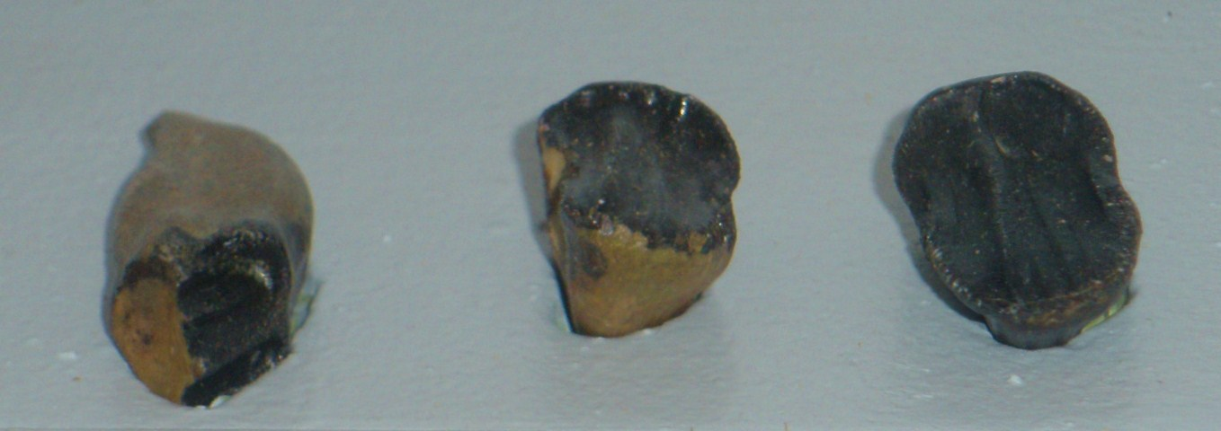 Fossil of Craspedodon, a ceratopsian dinosaur Took the photo at Musee d'Histoire Naturelle, Brussels